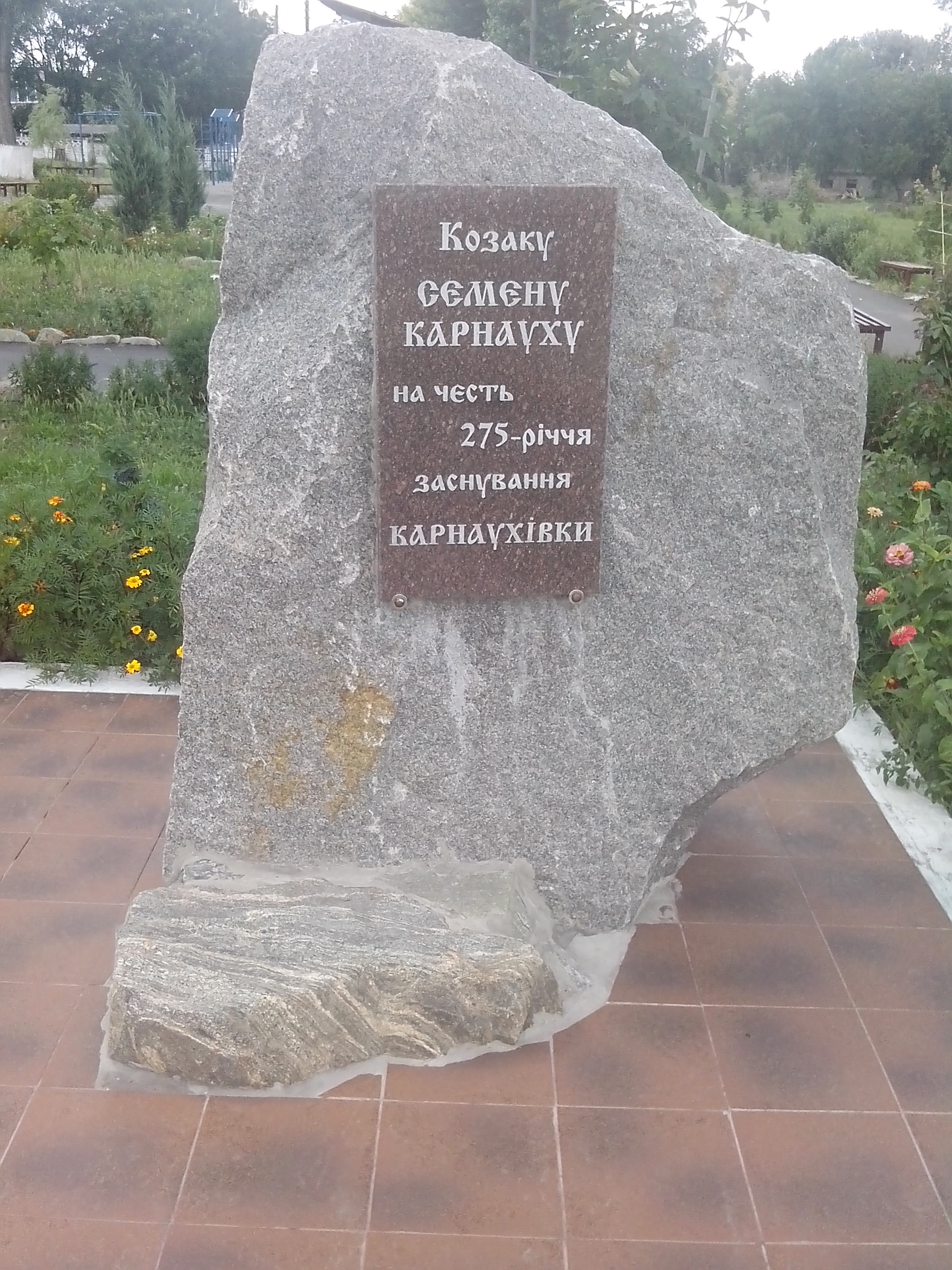 Памятник козаку Карнауху